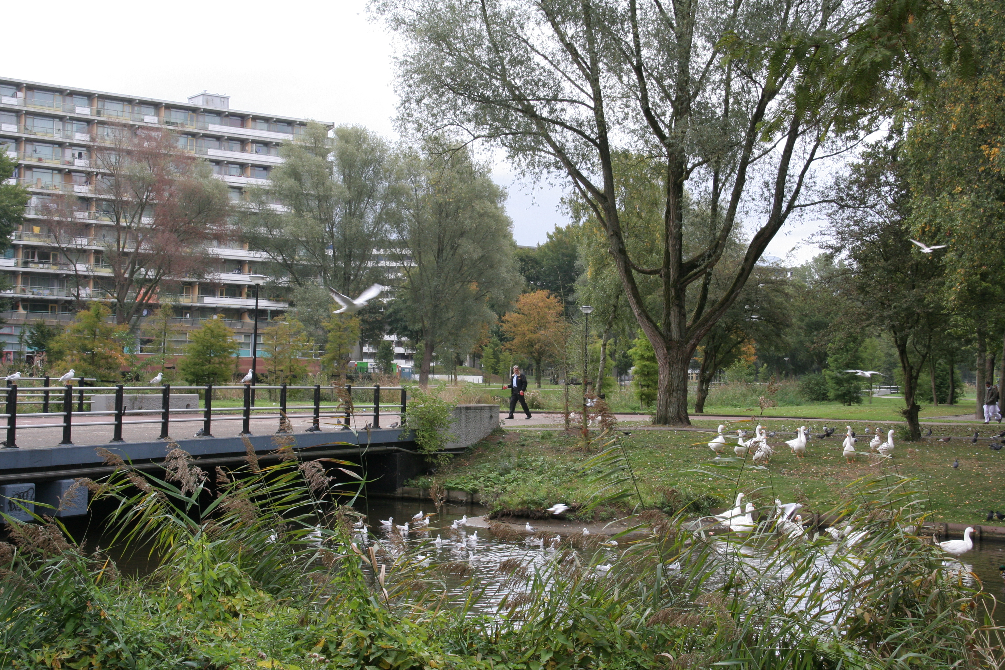 Openbaar groen in de Bijlmermeer. Groot van opzet tussen de 9-hoge flats.